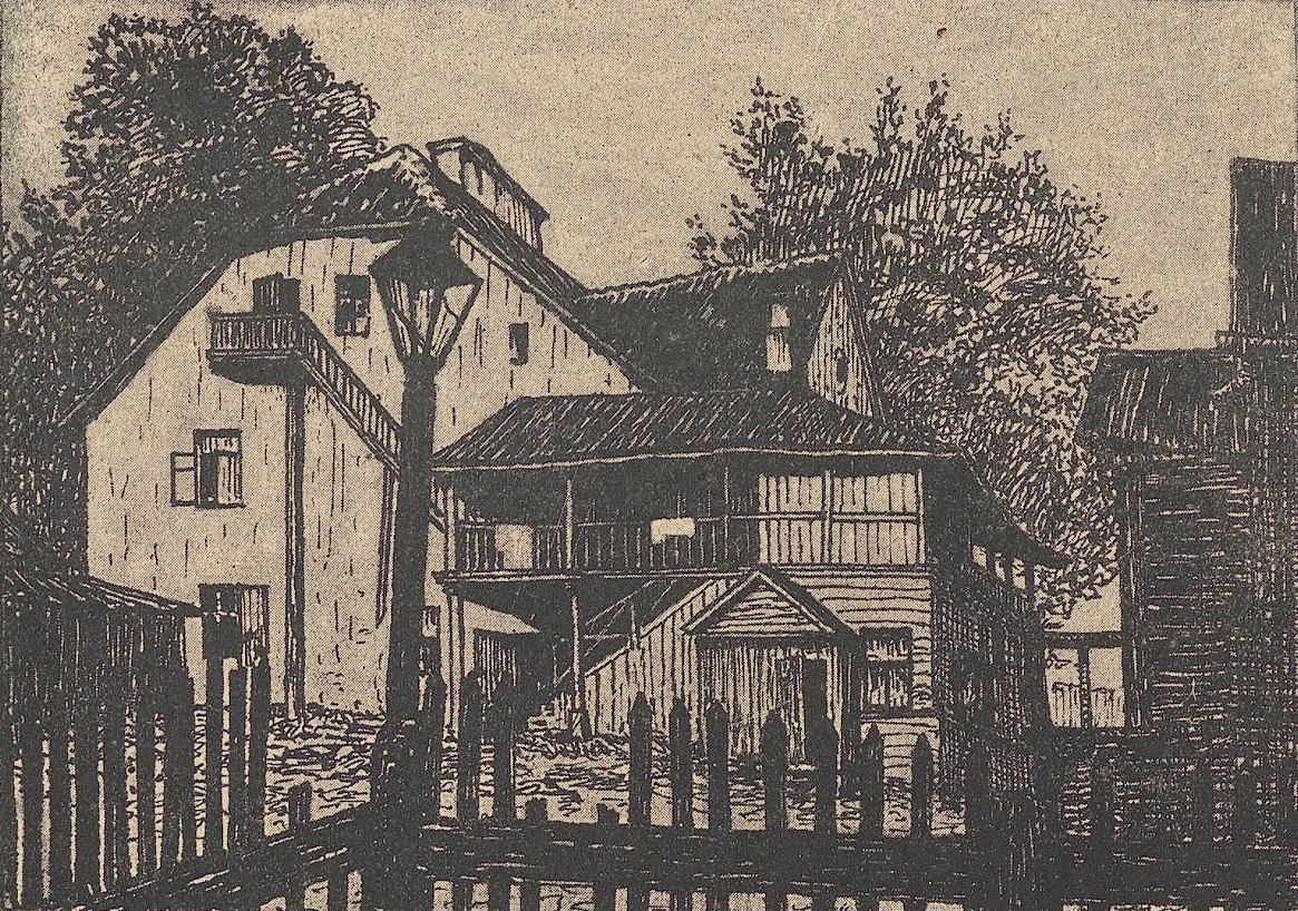 Беларуская (тарашкевіца): Вільня (Vilnia), Антокаль (Antokal). Сядзіба